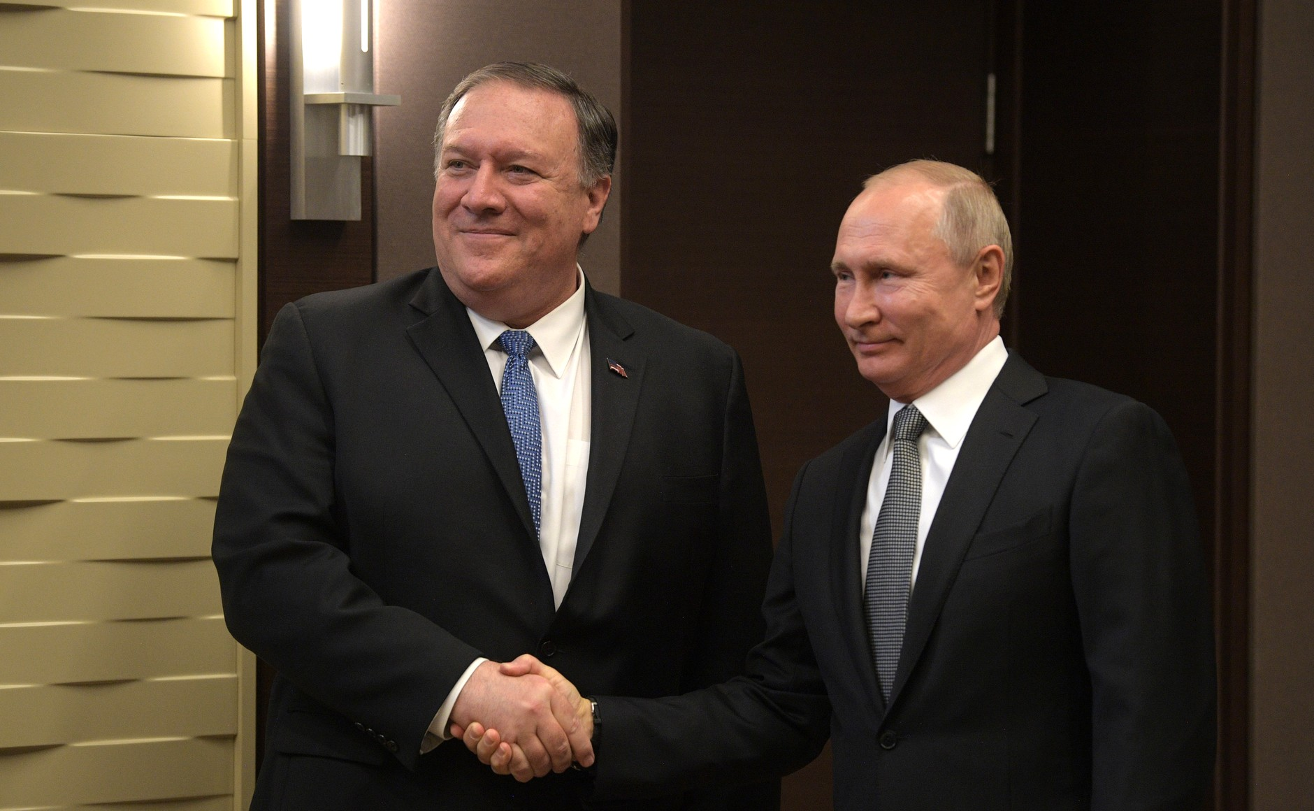 Встреча Президента России Владимира Путина с государственным секретарём Соединённых Штатов Америки Майком Помпео